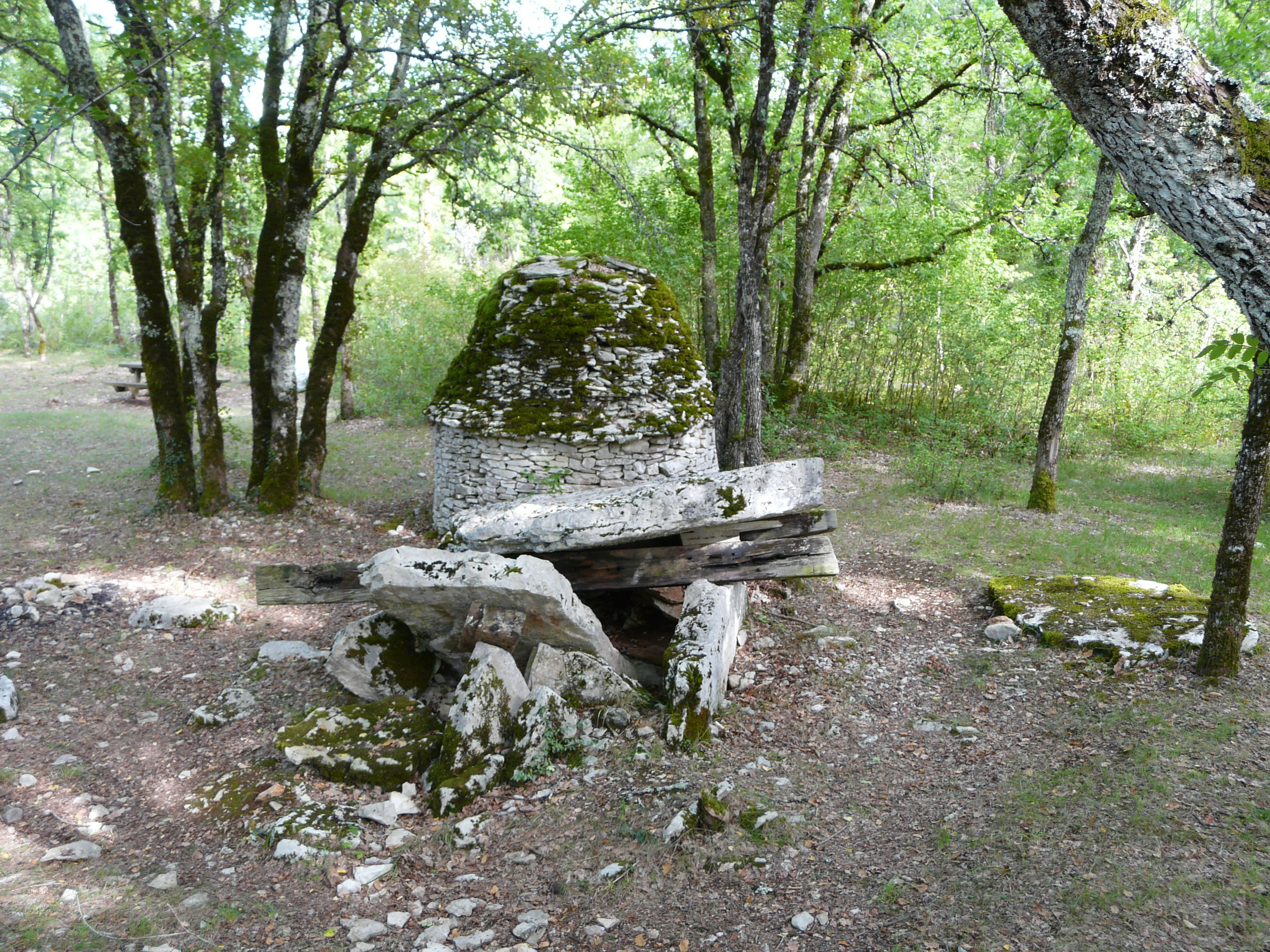 Le dolmen de Peyrelevade, Limeyrat, Dordogne, France.